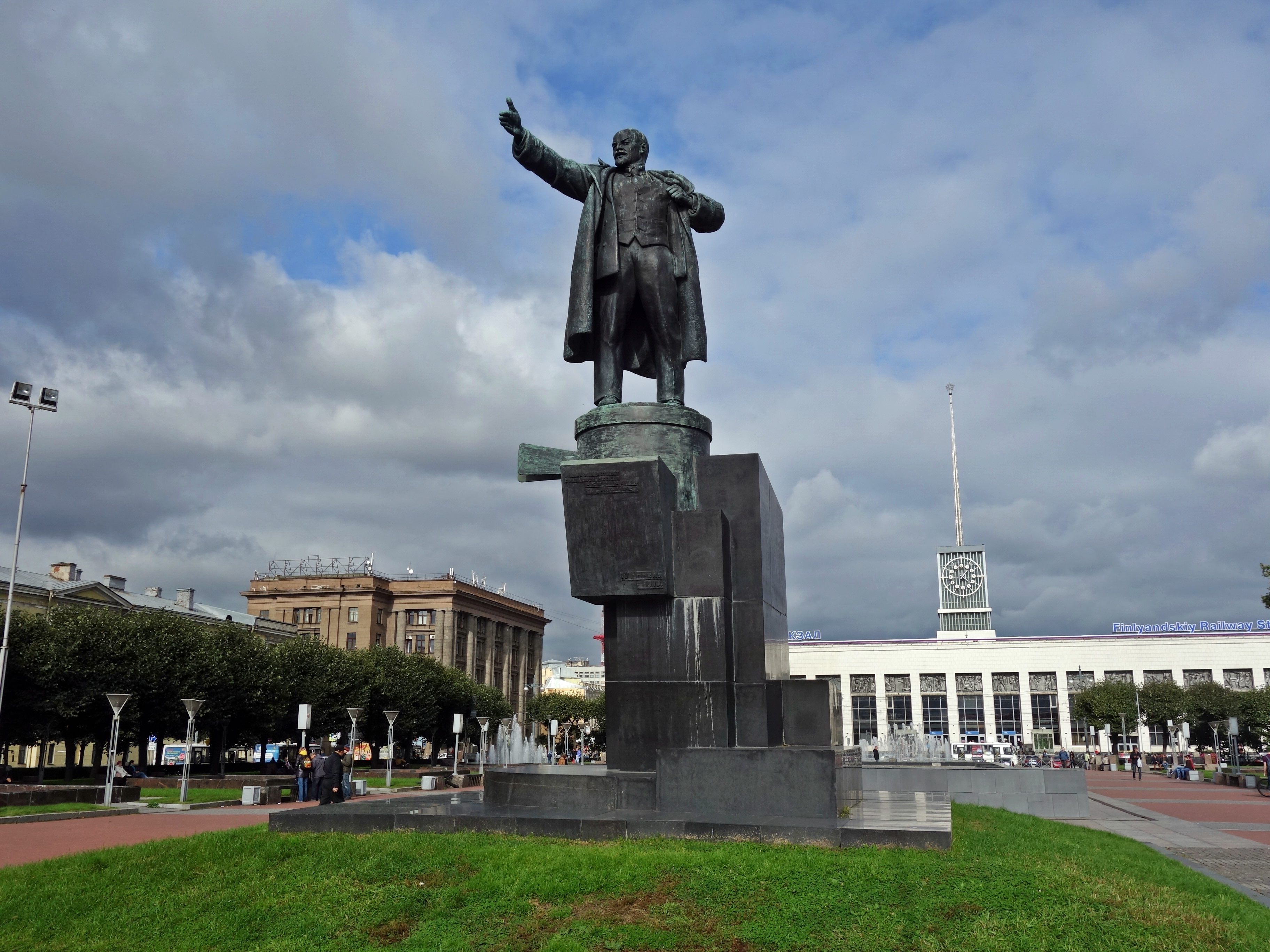 Памятник В.И. Ленину: площадь Ленина, Калининский район, Санкт-Петербург